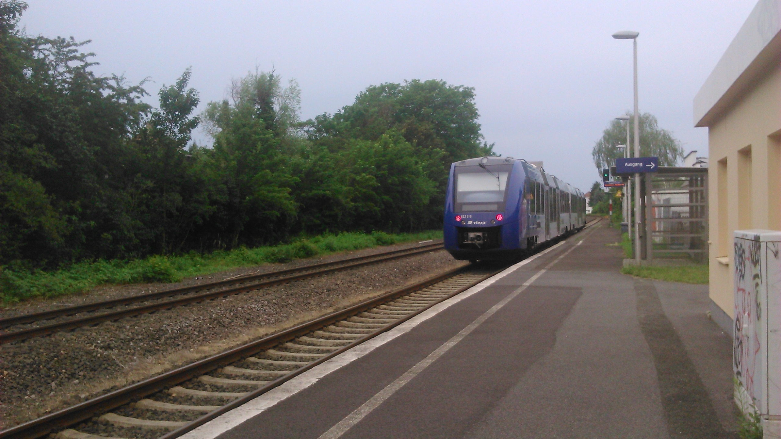 Haltepunkt Mainz-Gonsenheim, Zug Richtung Alzey fahrend